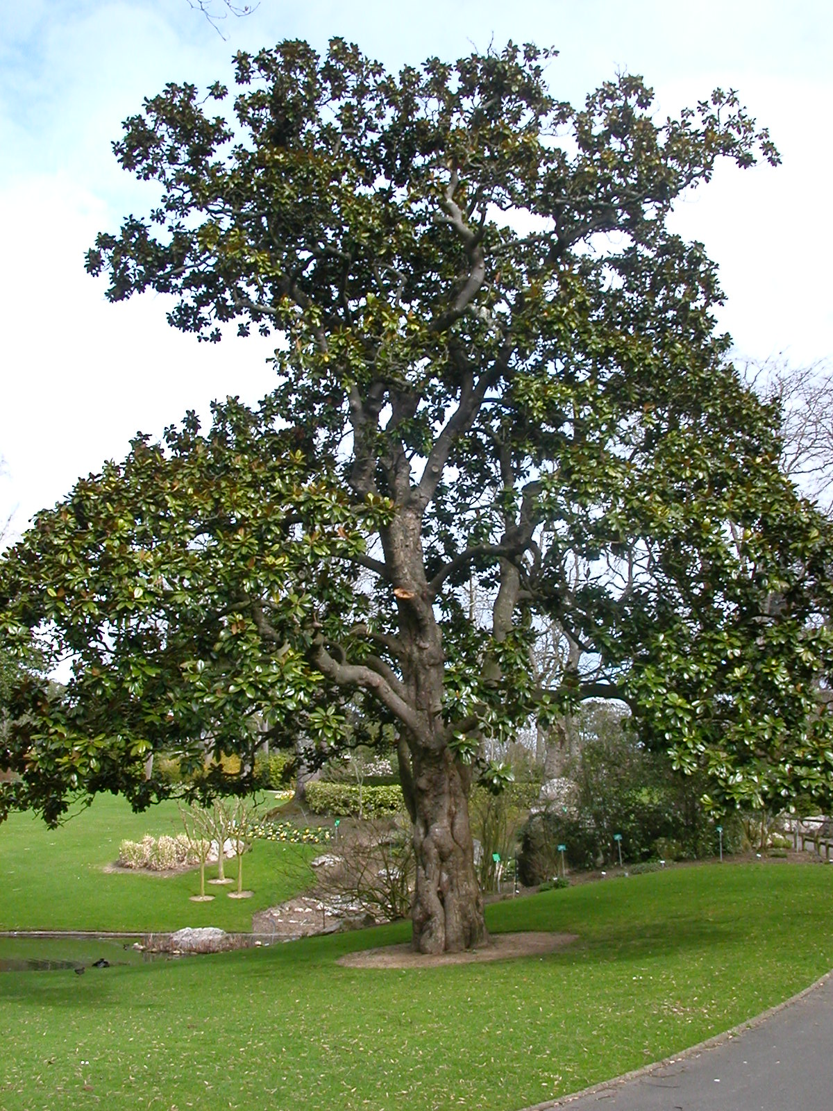 Magnolia planté par Hectot en 1807 au Jardin des plantes de Nantes